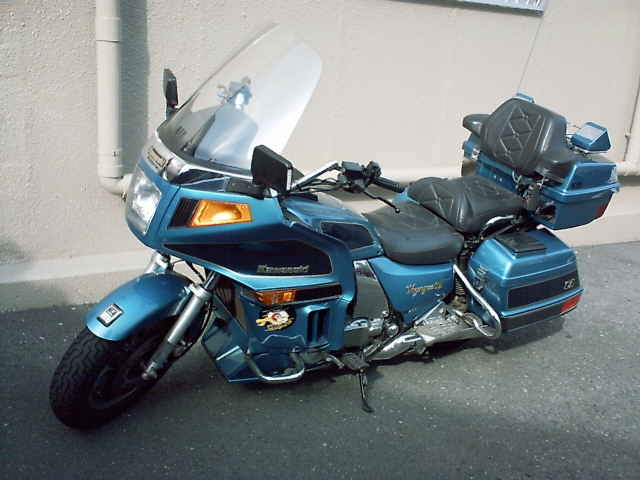 Ｋａｗａｓａｋｉ Ｖｏｙｇｅｒ ⅩⅡ ＜ZG1200-B9＞